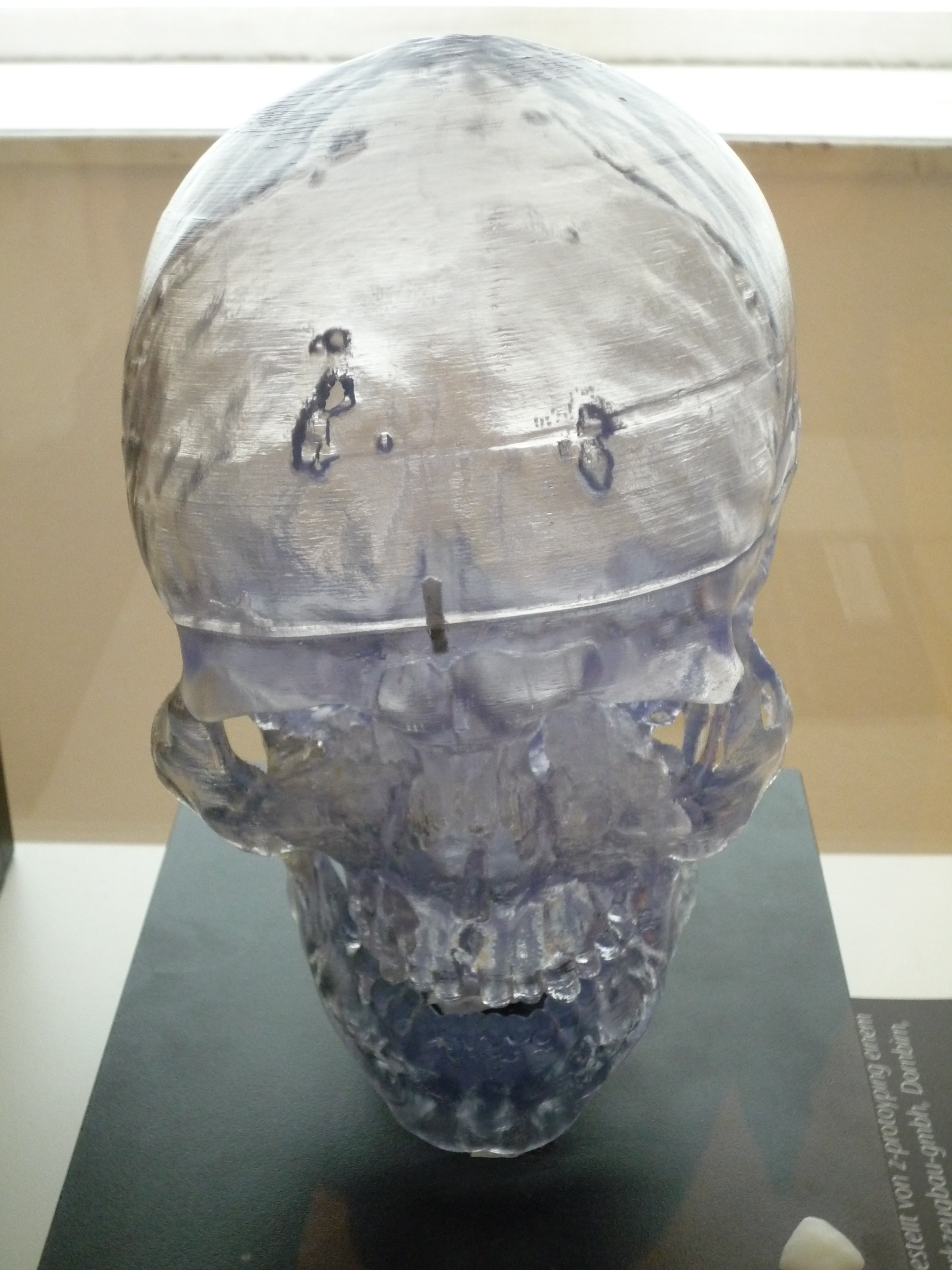 Schädel des Tiroler Eismanns, stereolithografisches Modell basierend auf CT-Daten von 1993.